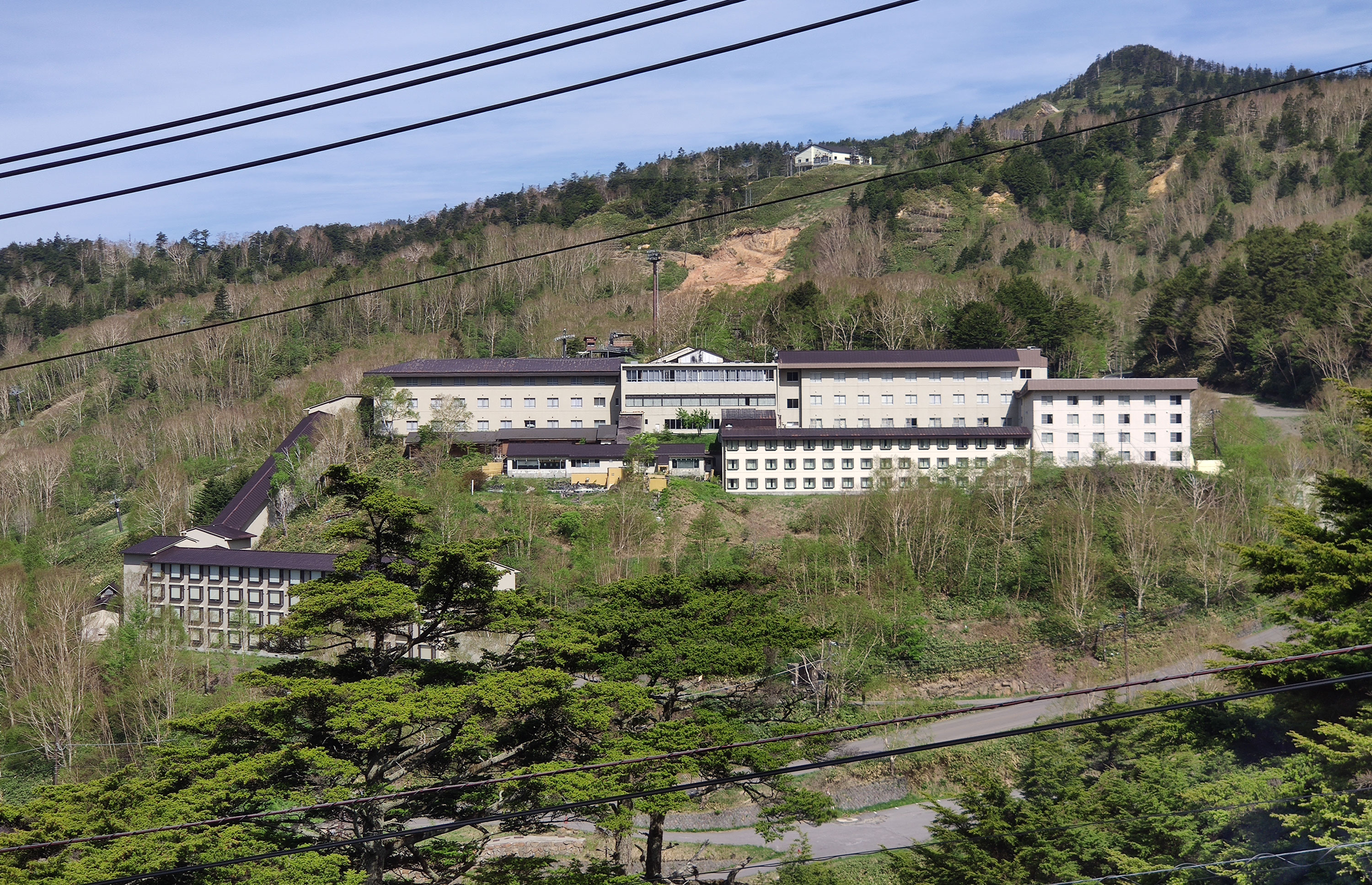 万座ホテル聚楽から見た万座プリンスホテル。2020年6月。